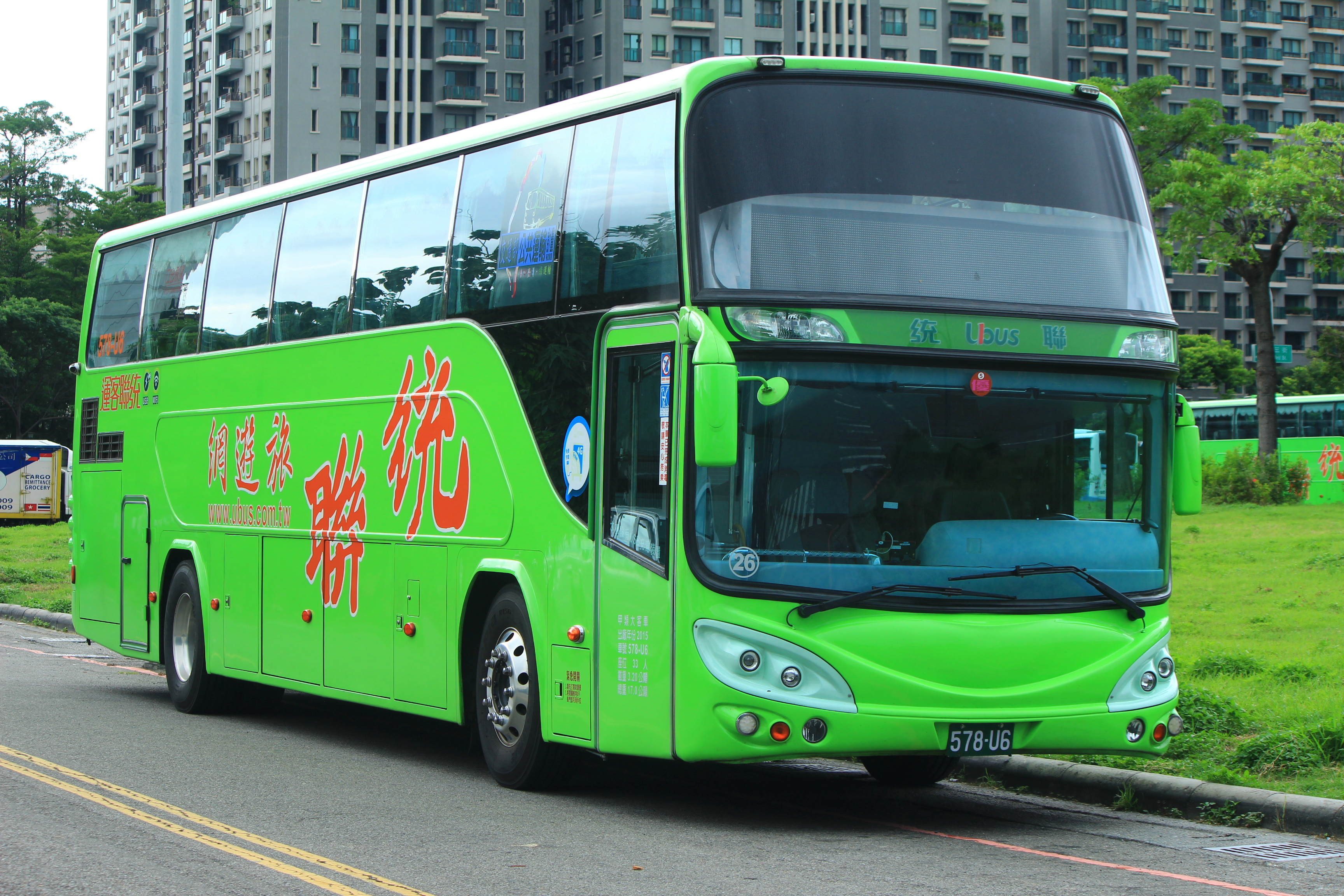 統聯客運2015年SCANIA K400IB4X2NB鉅巃車體大客車578-U6。